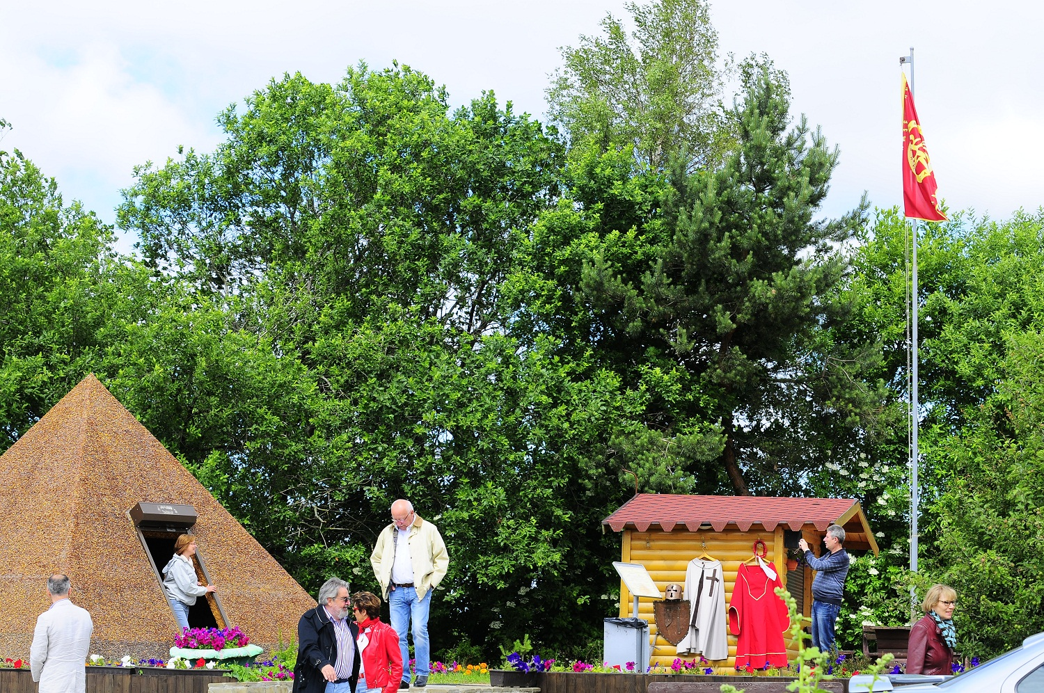 Туристическая смотровая площадка карьера Приморский АО «Калининградского янтарного комбината» с янтарной пирамидой.